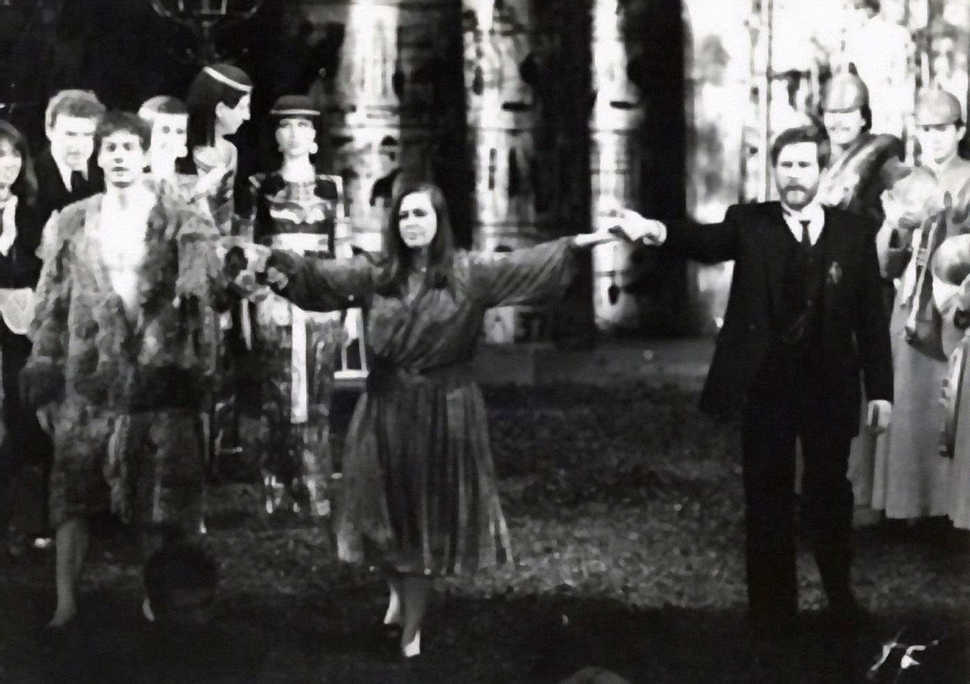 Гениетта Яновская на премьере спектакля «Собачье сердце» в Театре МТЮЗ (1989 год).